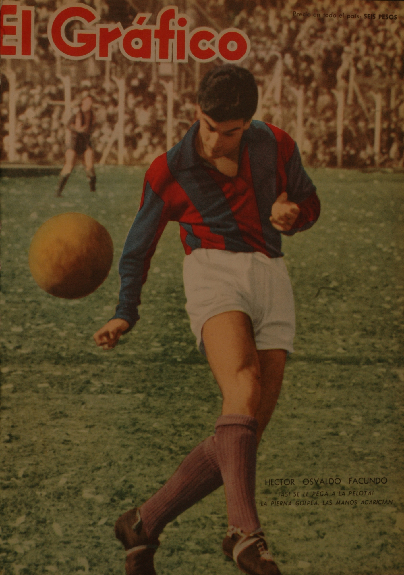 El Grafico del 23 de Septiembre de 1959. Edicion 2087